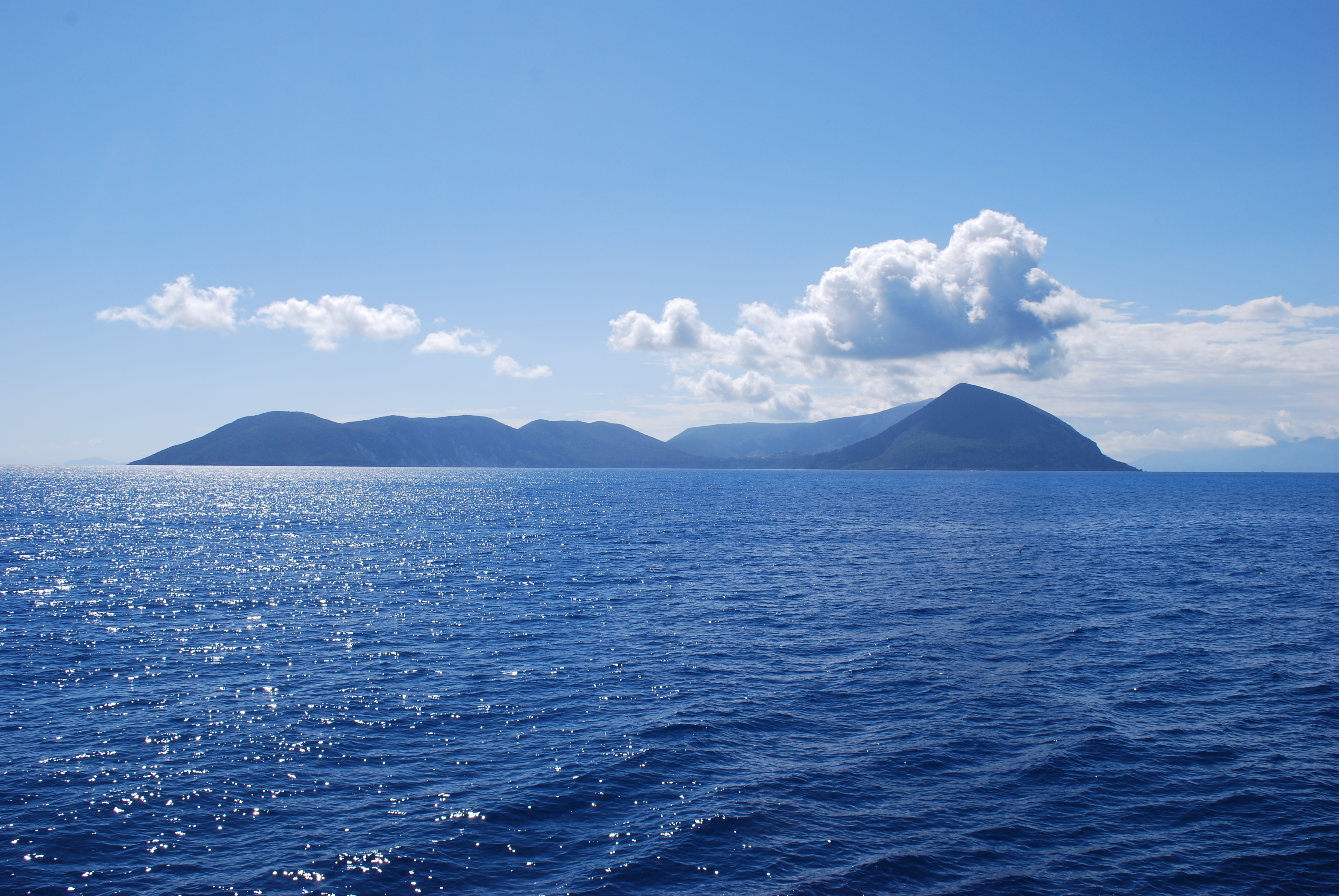 Vue de la traversée entre Fiskardo (Kephalonia) et Vassili (Lefkada), à bord du ferry "Captain Aristidis".